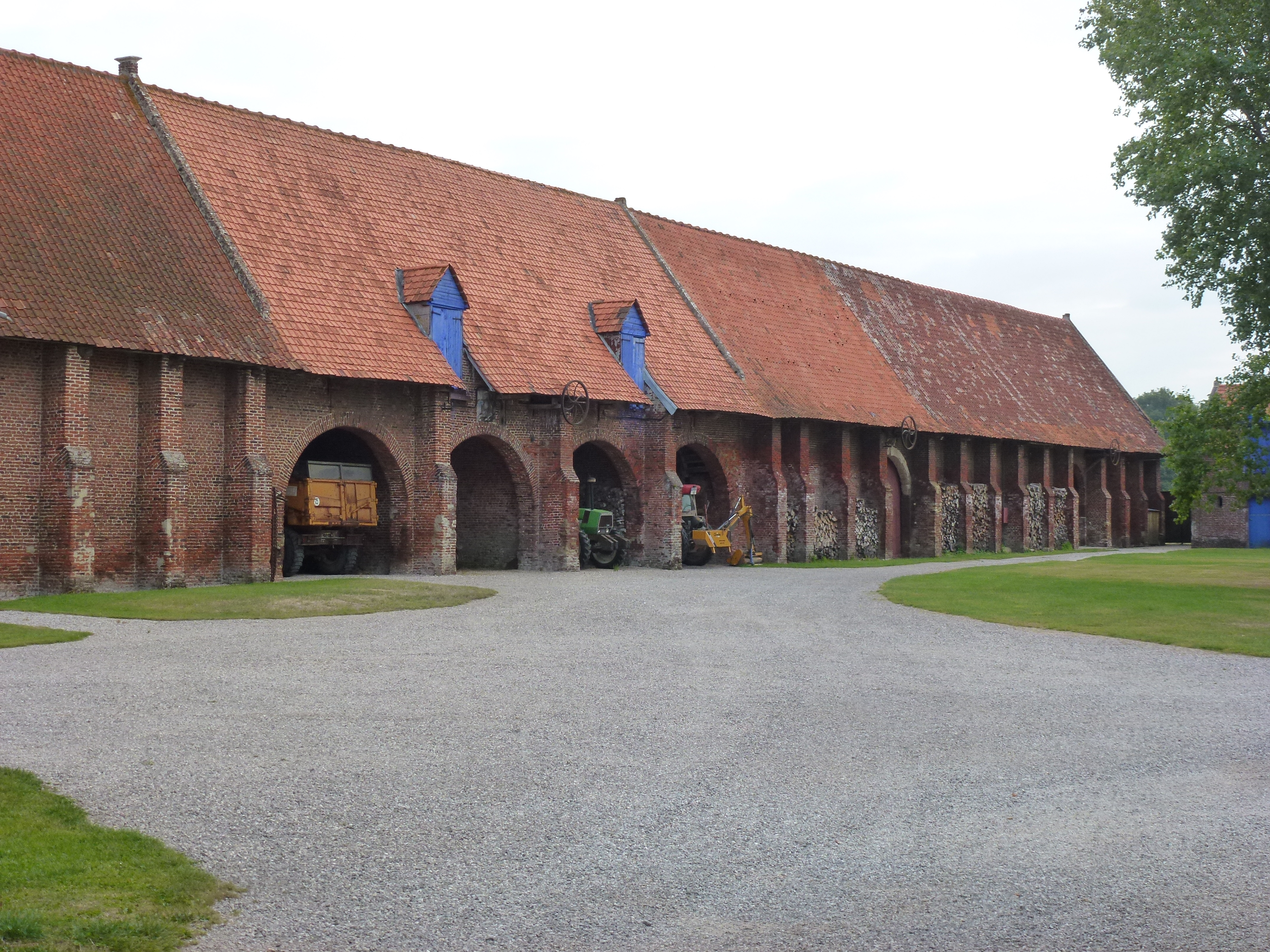 Clairmarais (Pas-de-Calais, Fr) Ancienne abbaye cistercienne PA00108253 .